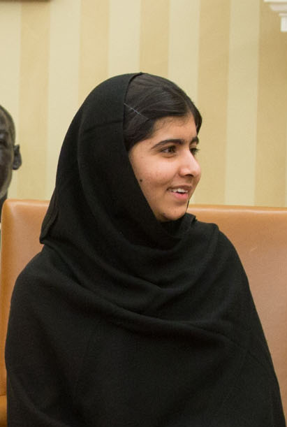 Malala Yousafzai